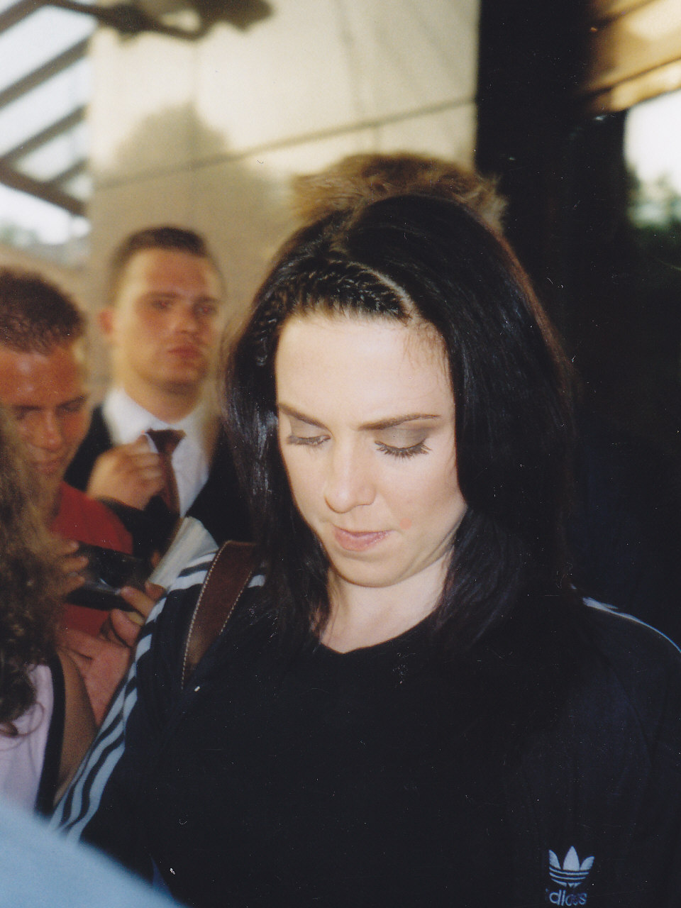 Melanie C (2003)